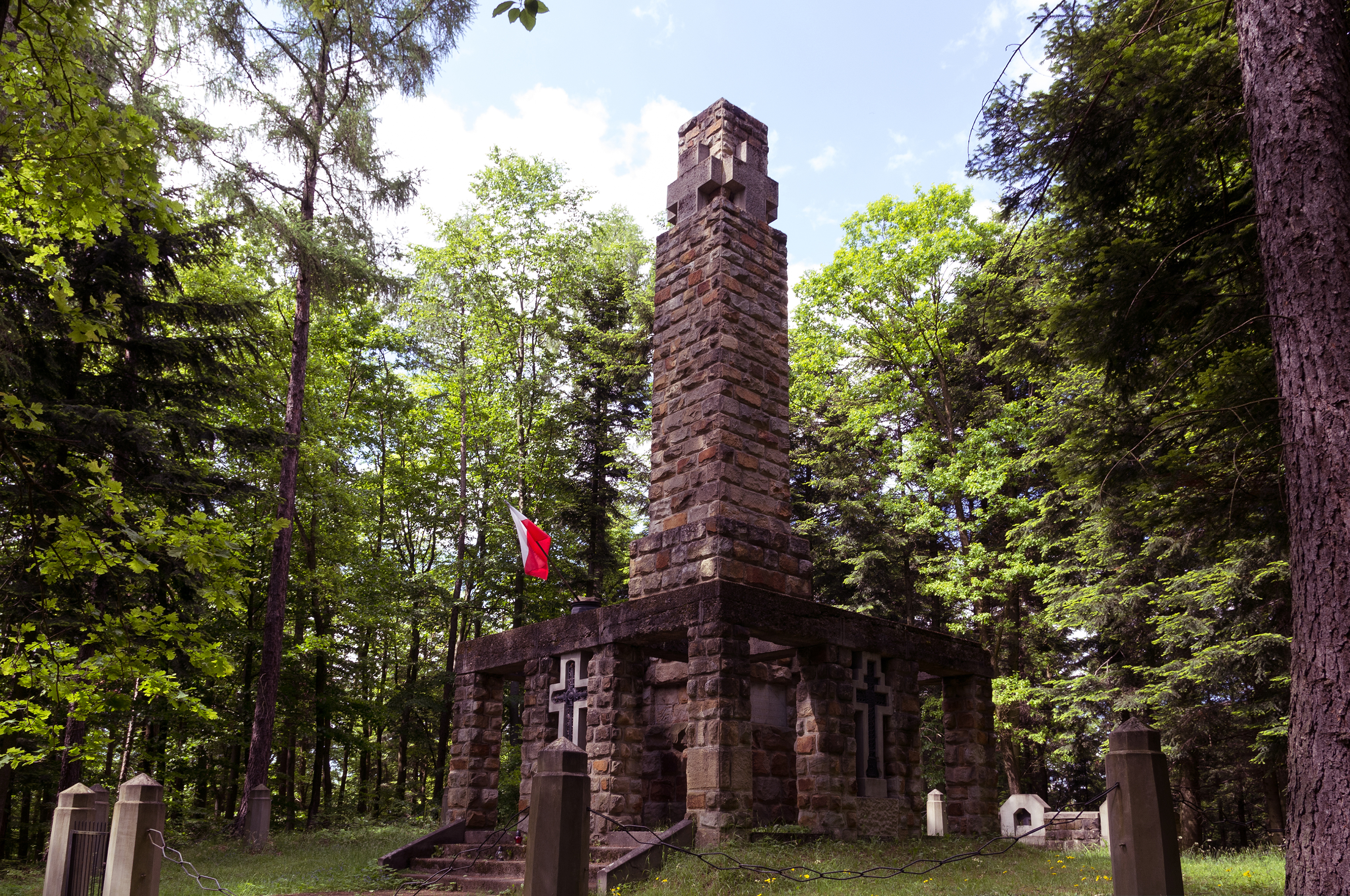 Cmentarz wojenny nr 290 Charzewice